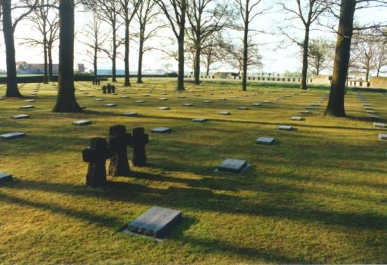 Description Duitse militaire begraafplaats Langemark DateUnknown dateSourceGemeente Langemark-PoelkapelleAuthorGemeente Langemark-Poelkapelle Duitse militaire begraafplaats Langemark